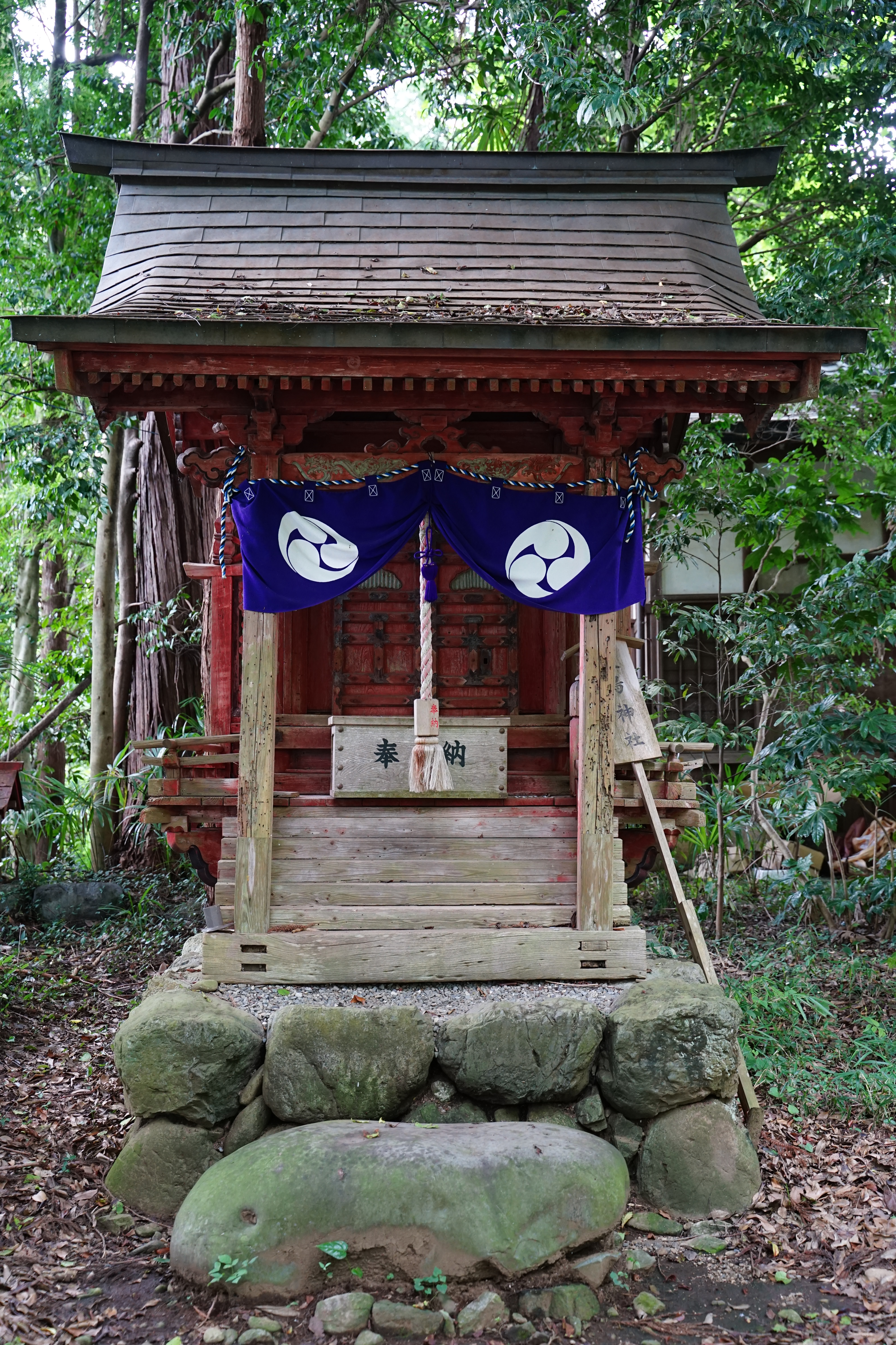 阿伎留神社の大鳥神社（東京都あきる野市）